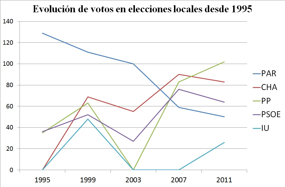 Evolución del voto en las elecciones locales de Ejulve desde 1995 a 2011.